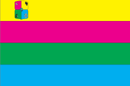 Прапор Шишацького району